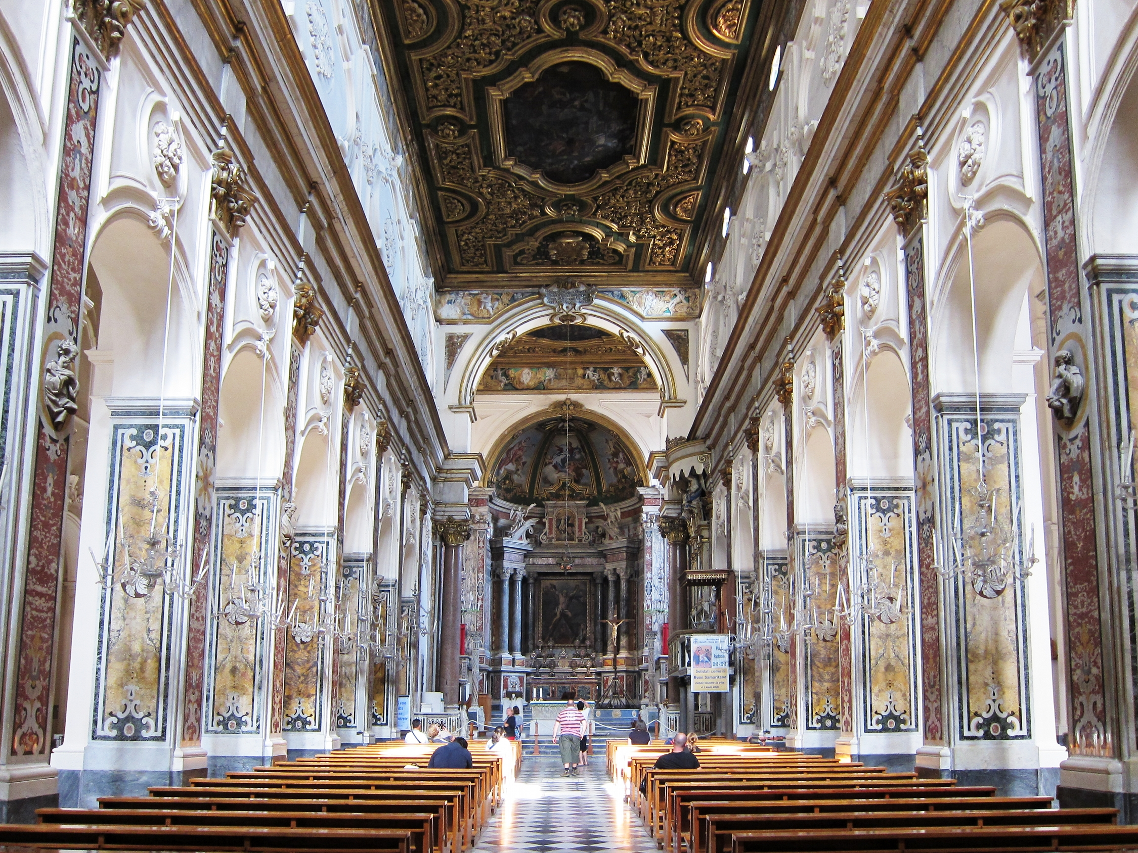 Nef du Duomo d'Amalfi (Italie).